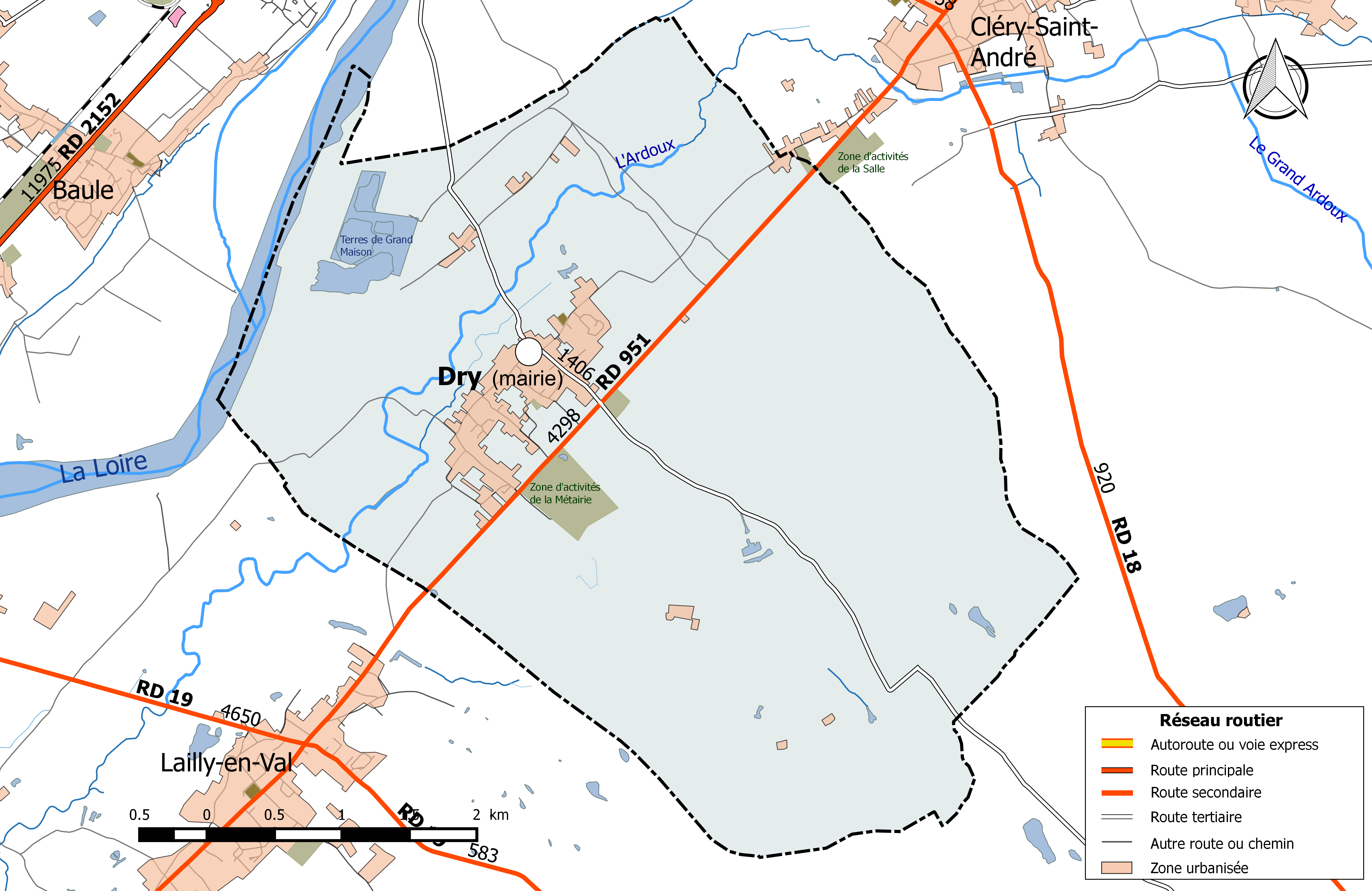 Carte du réseau routier de la commune de Dry (Loiret).